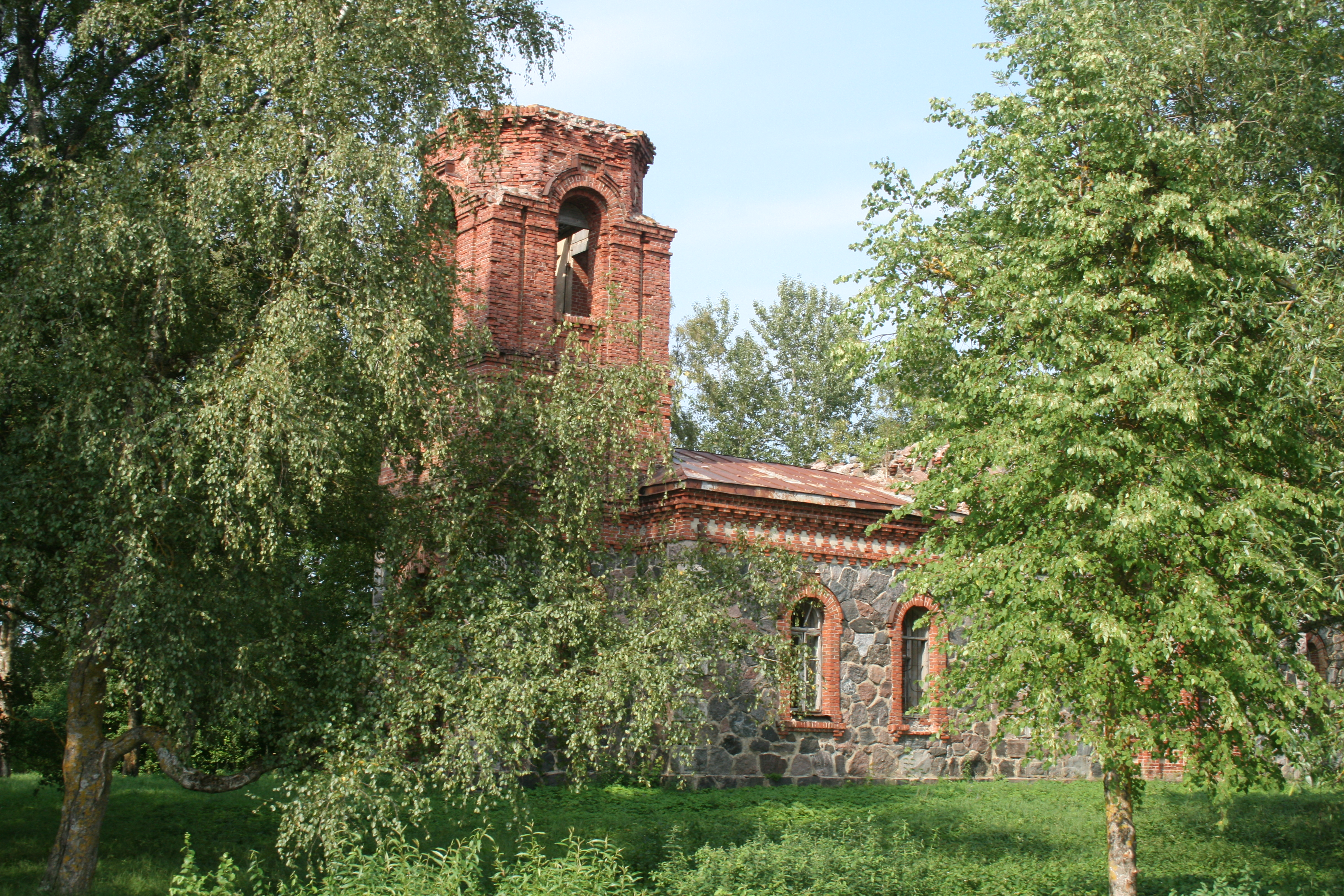 Ruine der Kirche von Mäemõisa. Panga, Gemeinde Ridala